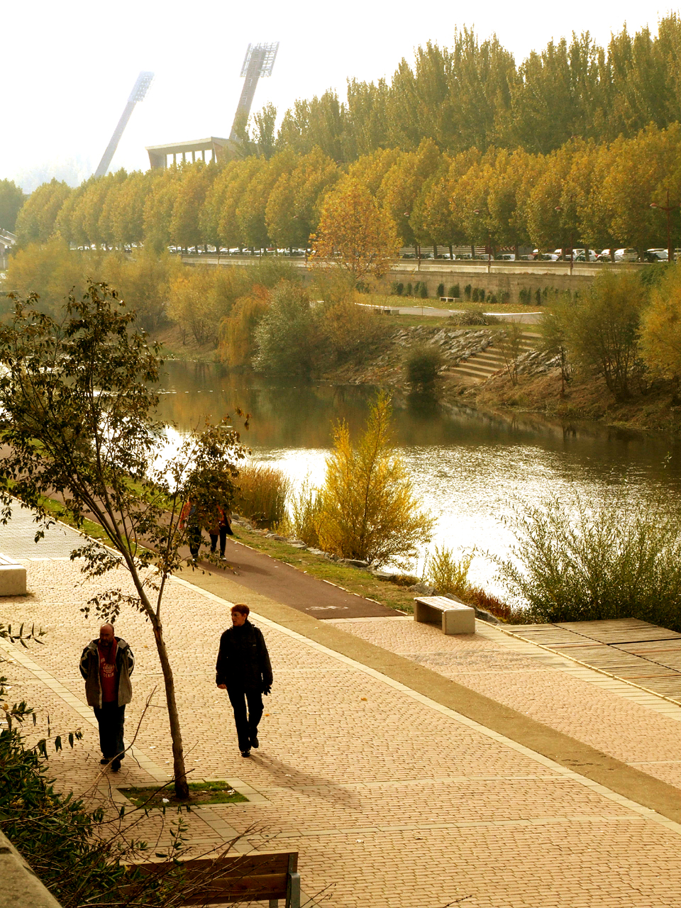 Río Bernesga.